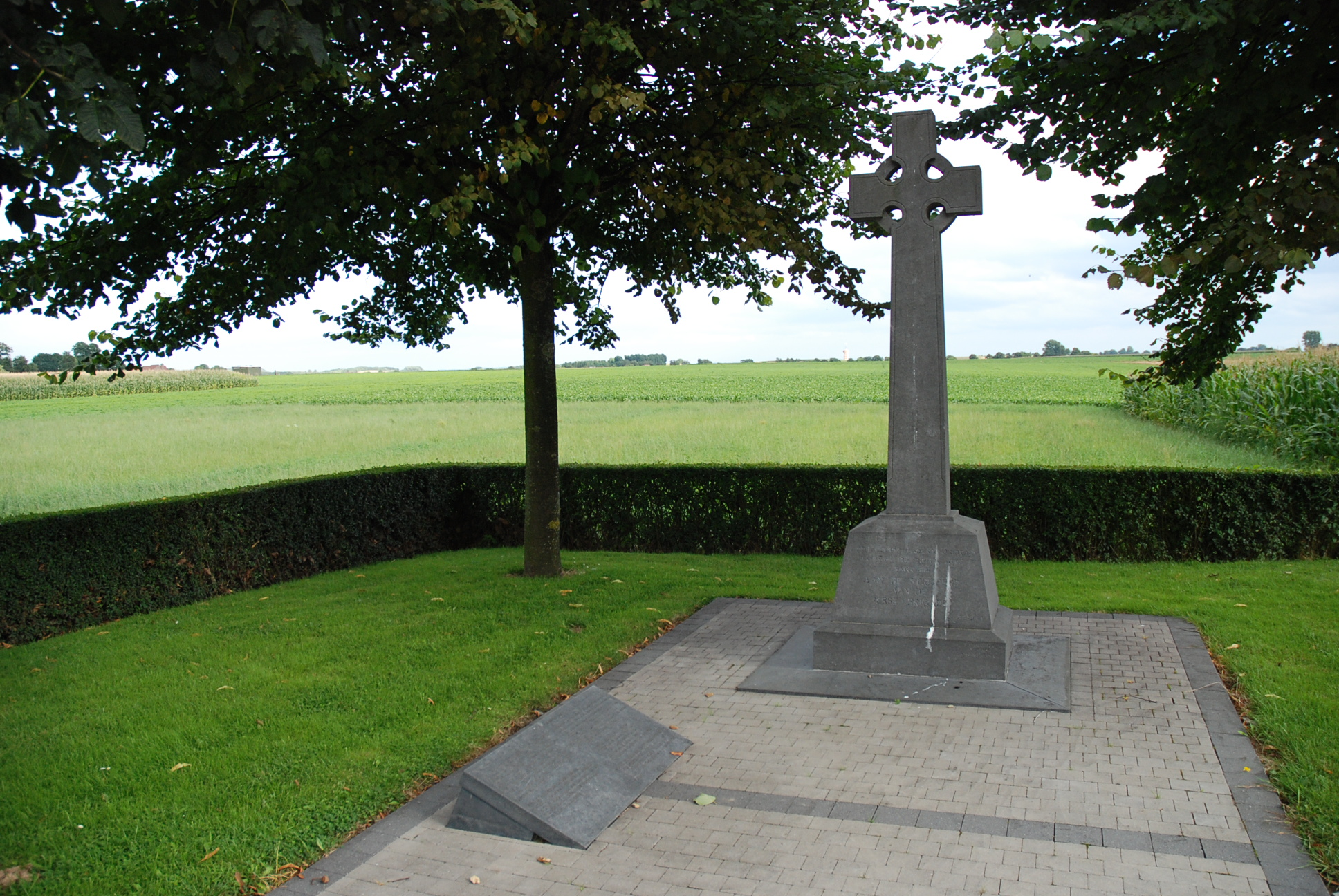 Het Iers kruis dat herinnert aan de meer dan 800 Ieren die sneuvelden tijdens de slag bij Lafelt